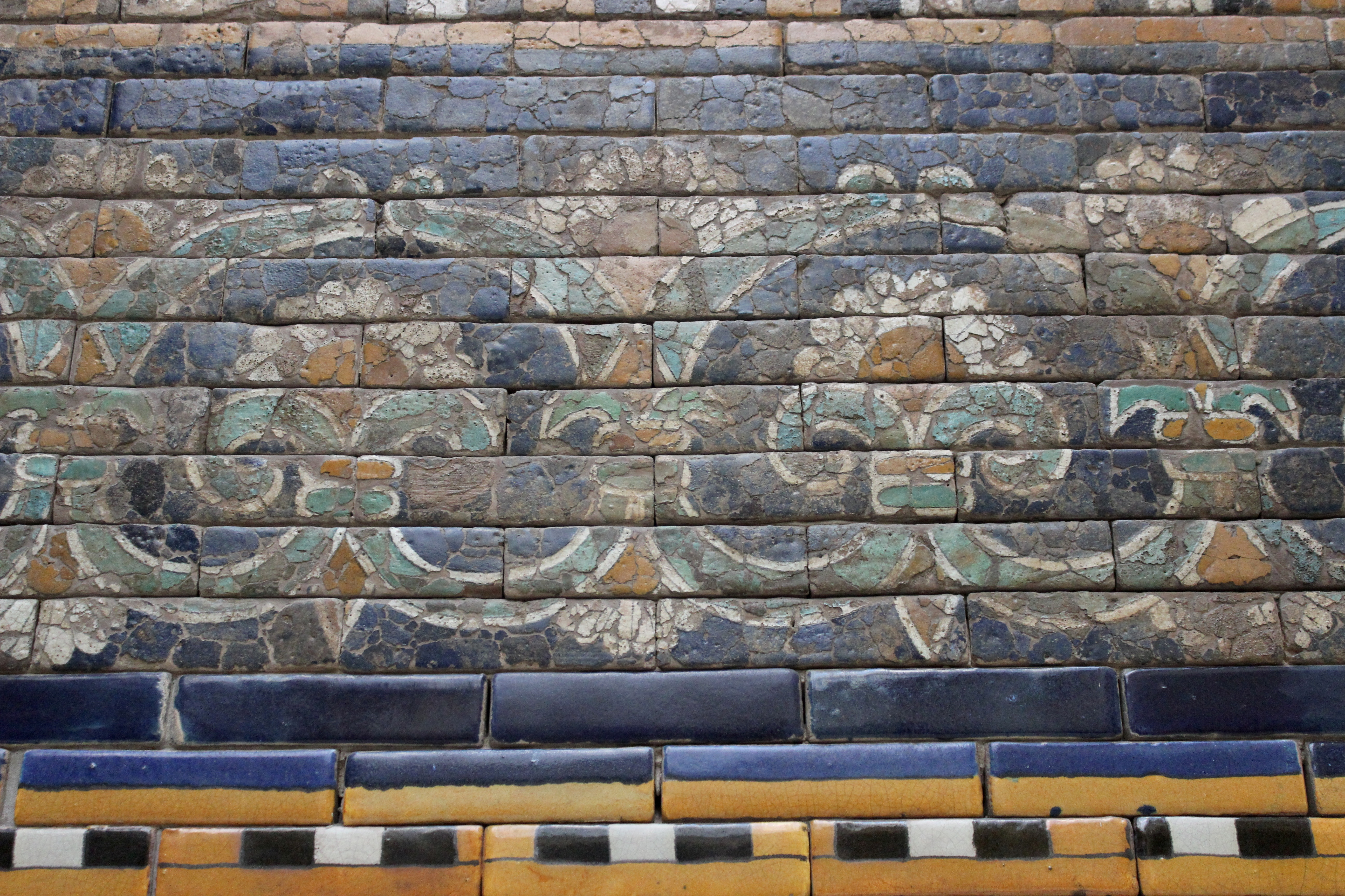 Berlín, Pergamon Museum. Puerta de Ishtar.